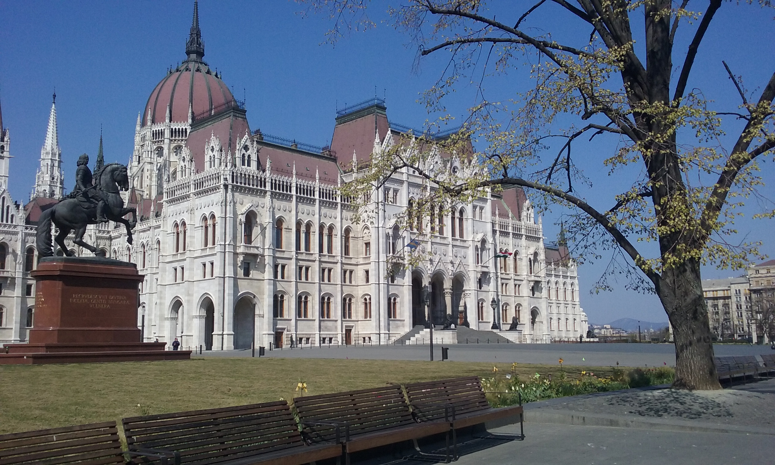 A koronavírus-járvány miatt üres Kossuth-tér Budapesten